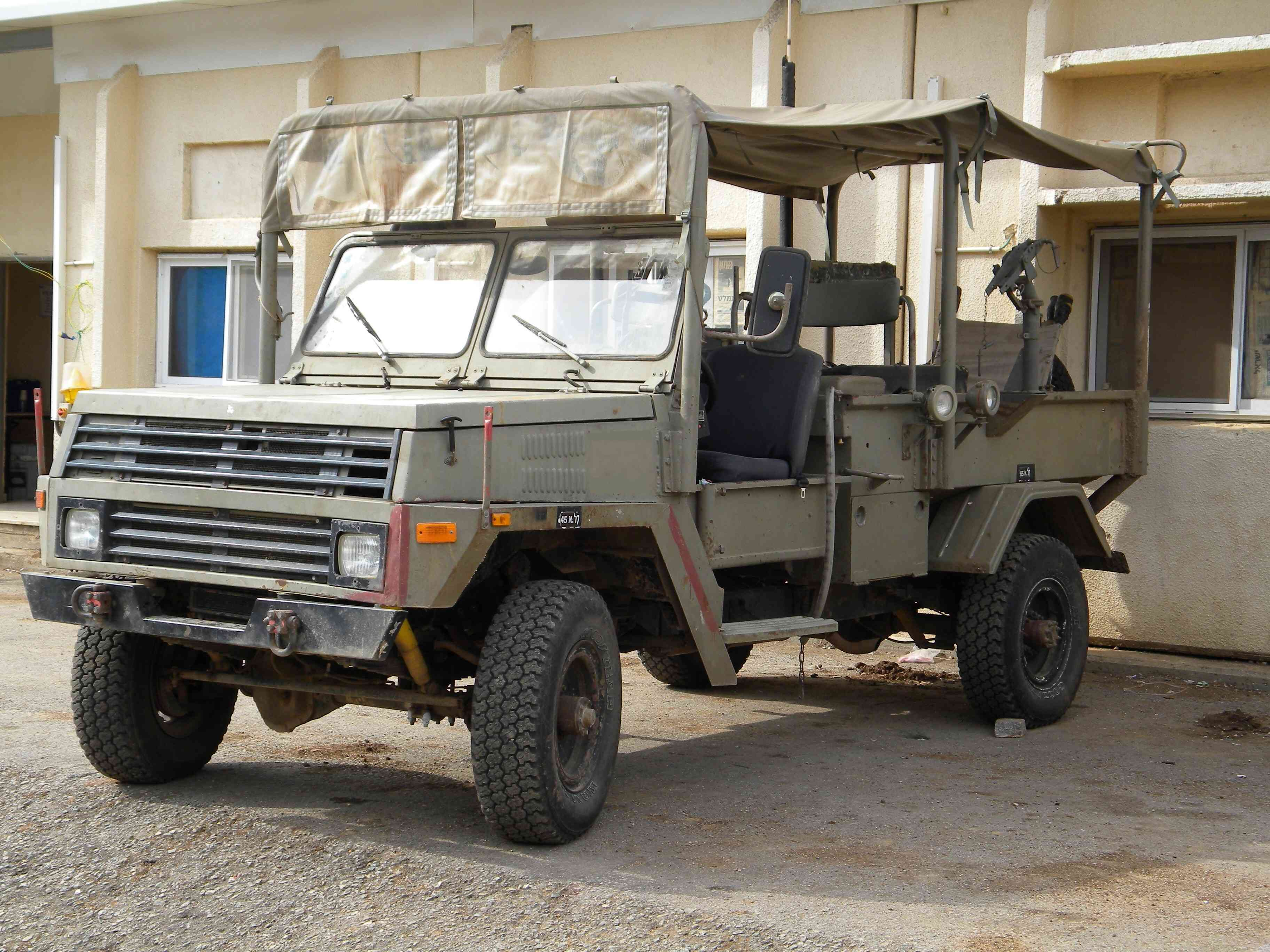 בט"שית אביר